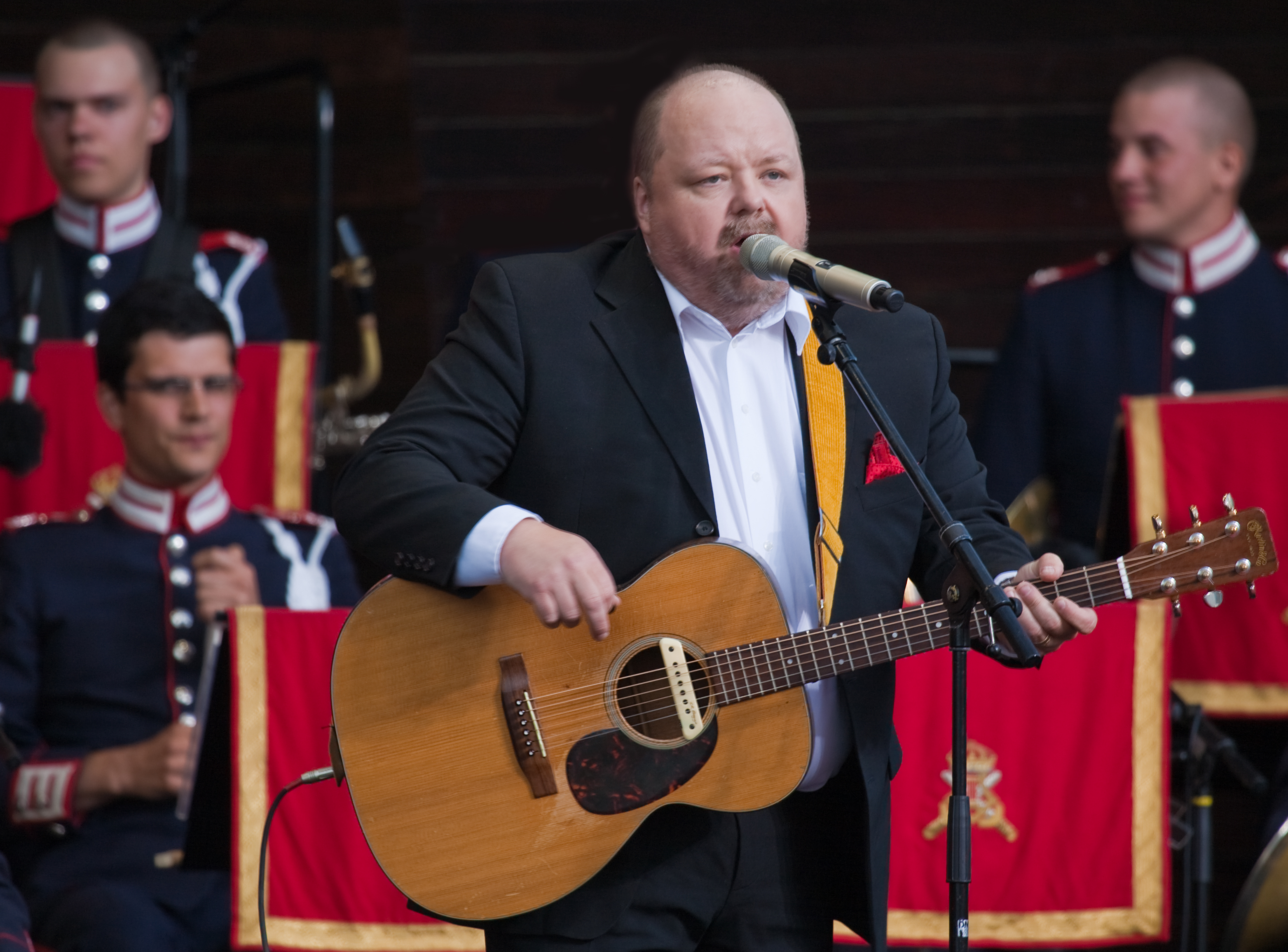 Kalle Moraeus uppträder på Skansen i Stockholm på Sveriges nationaldag 2010.